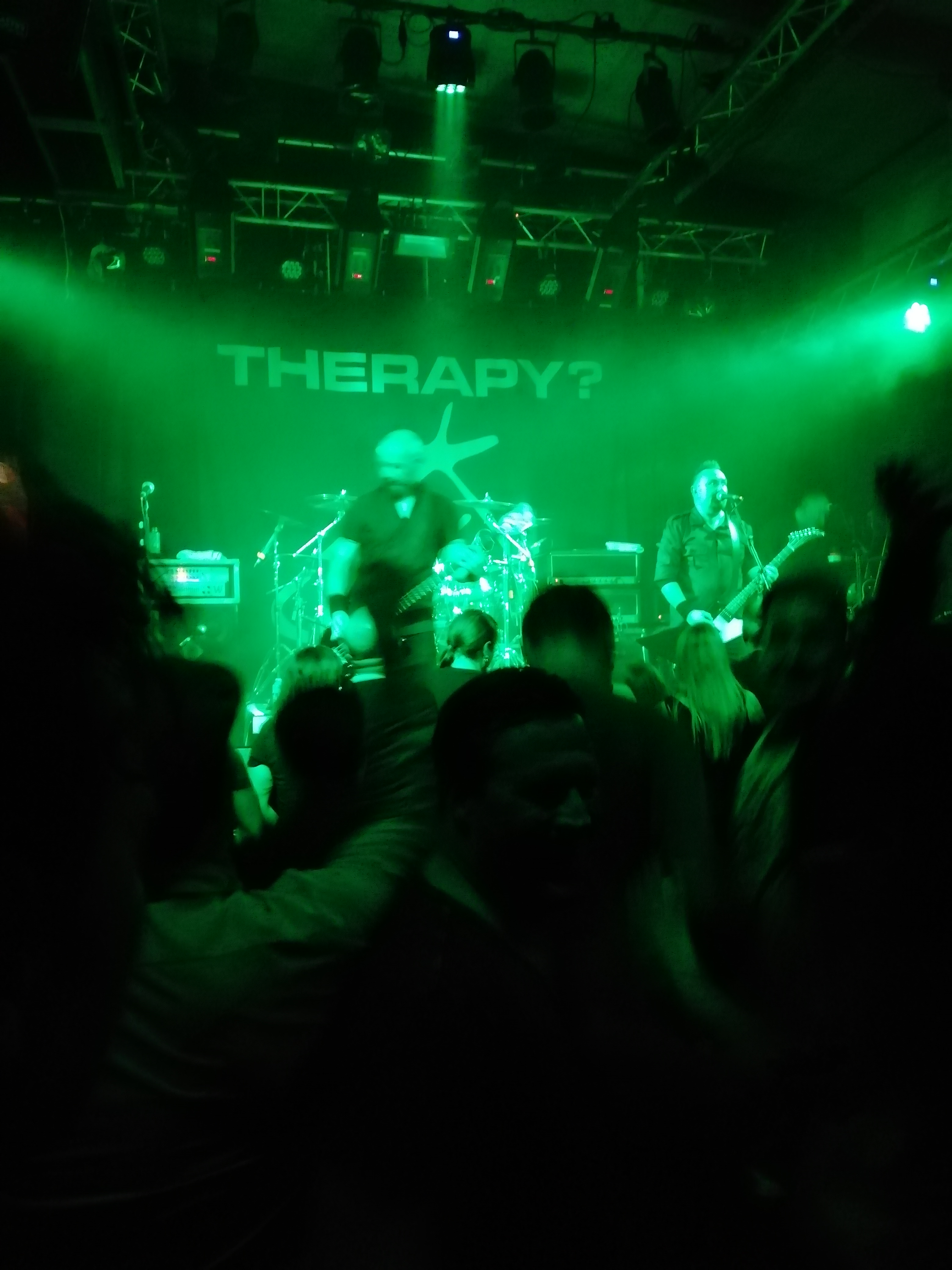 Concert de Therapy? a la sala Gebaude 9 de Còlonia, 13 d'octubre del 2018.